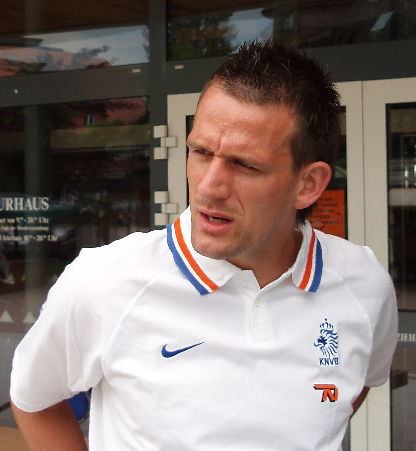 Jan Vennegoor of Hesselink, Spieler der niederländischen Fußballnationalmannschaft